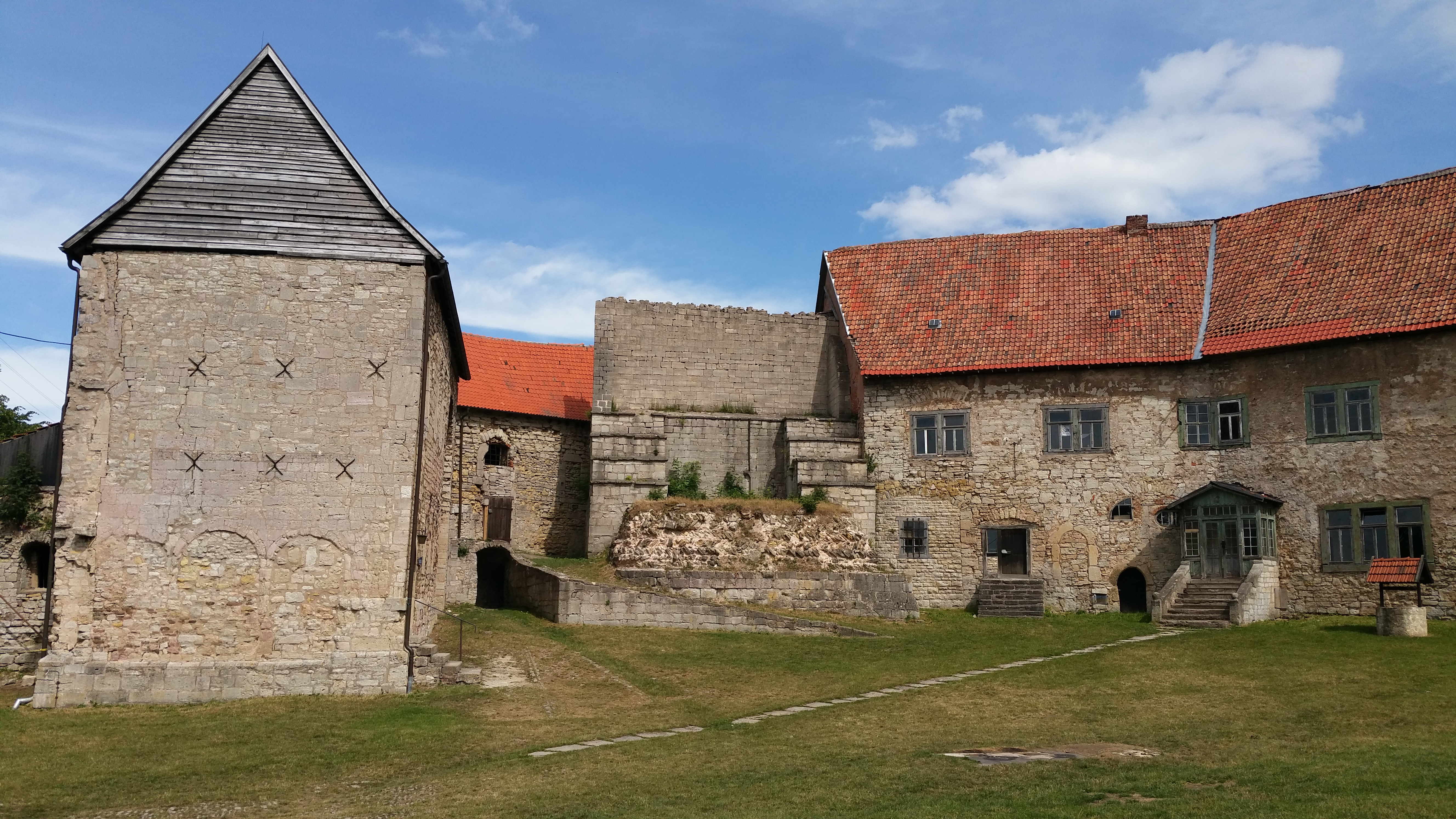 Großlohra, Germany